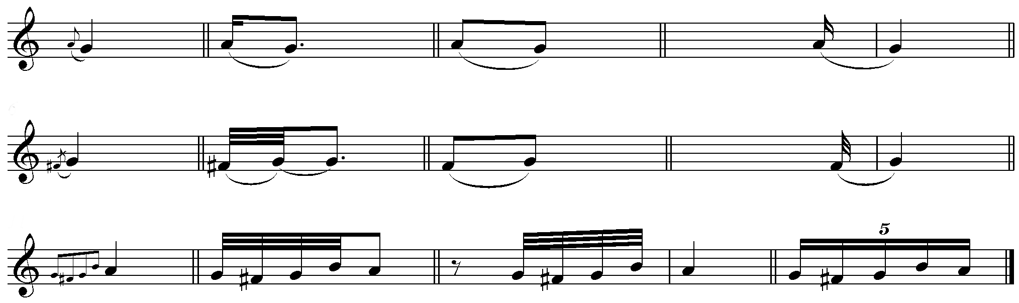 voorslag